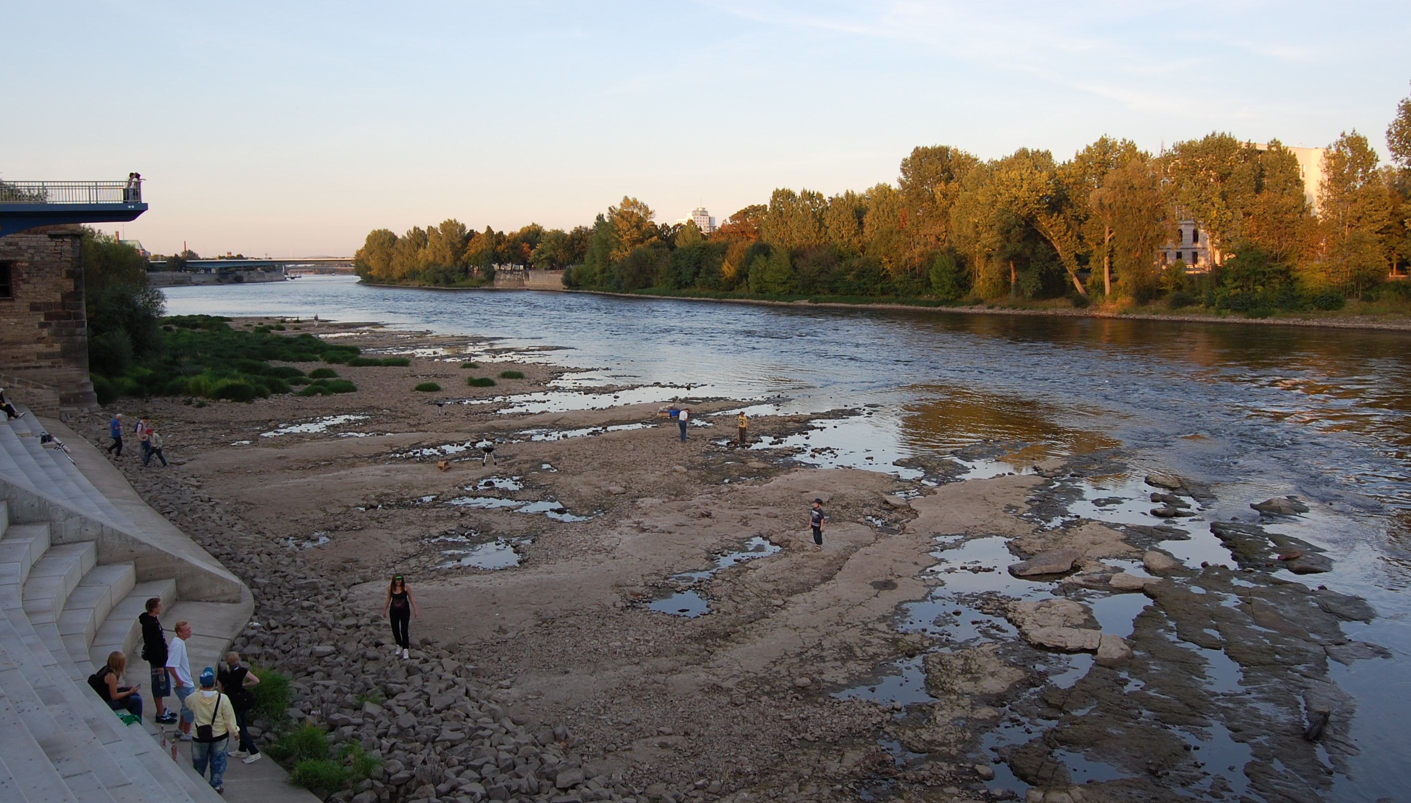 Domfelsen in der Elbe, unterhalb des Magdeburger Doms